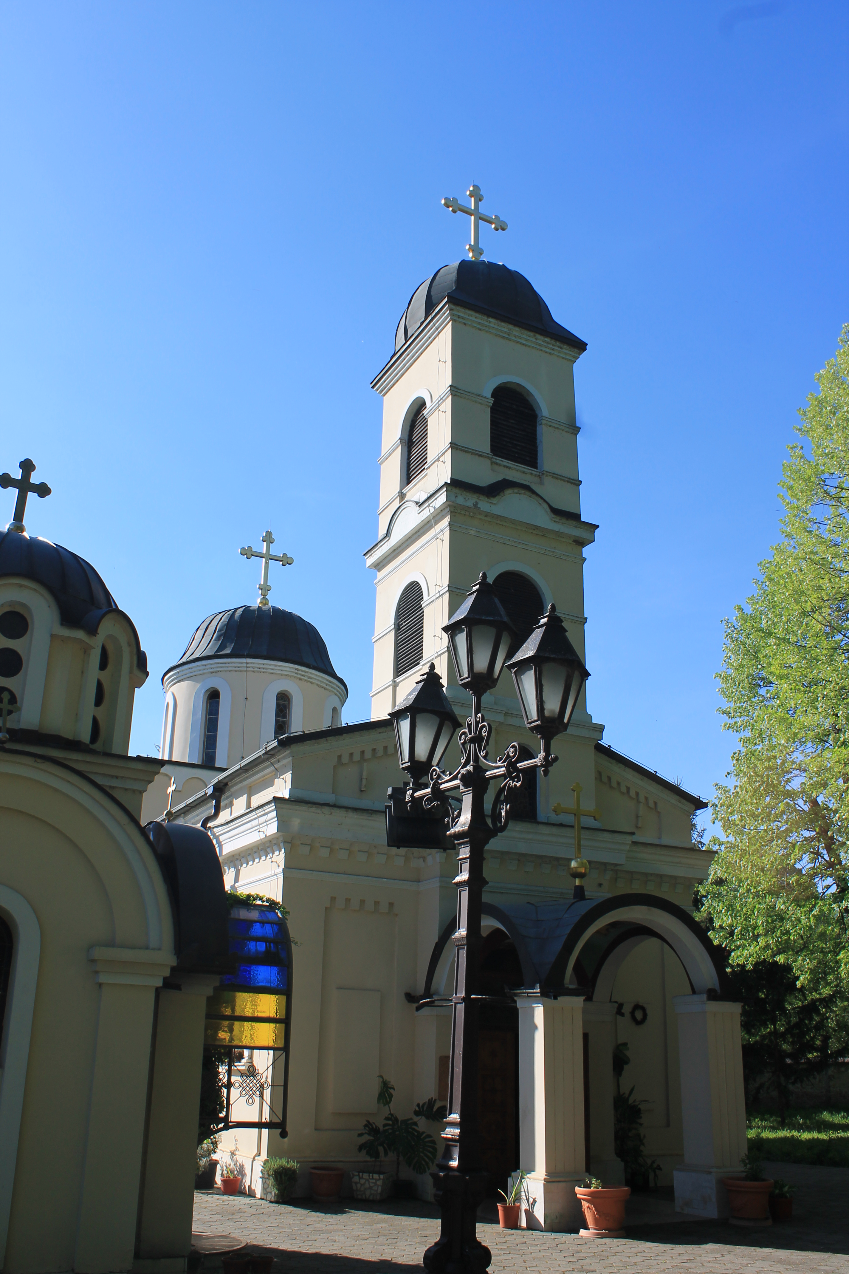 Crkva Sv. Pavla Petrovaradin